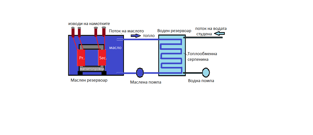 водно охлаждане на маслен трансформатор.Принципна схема.